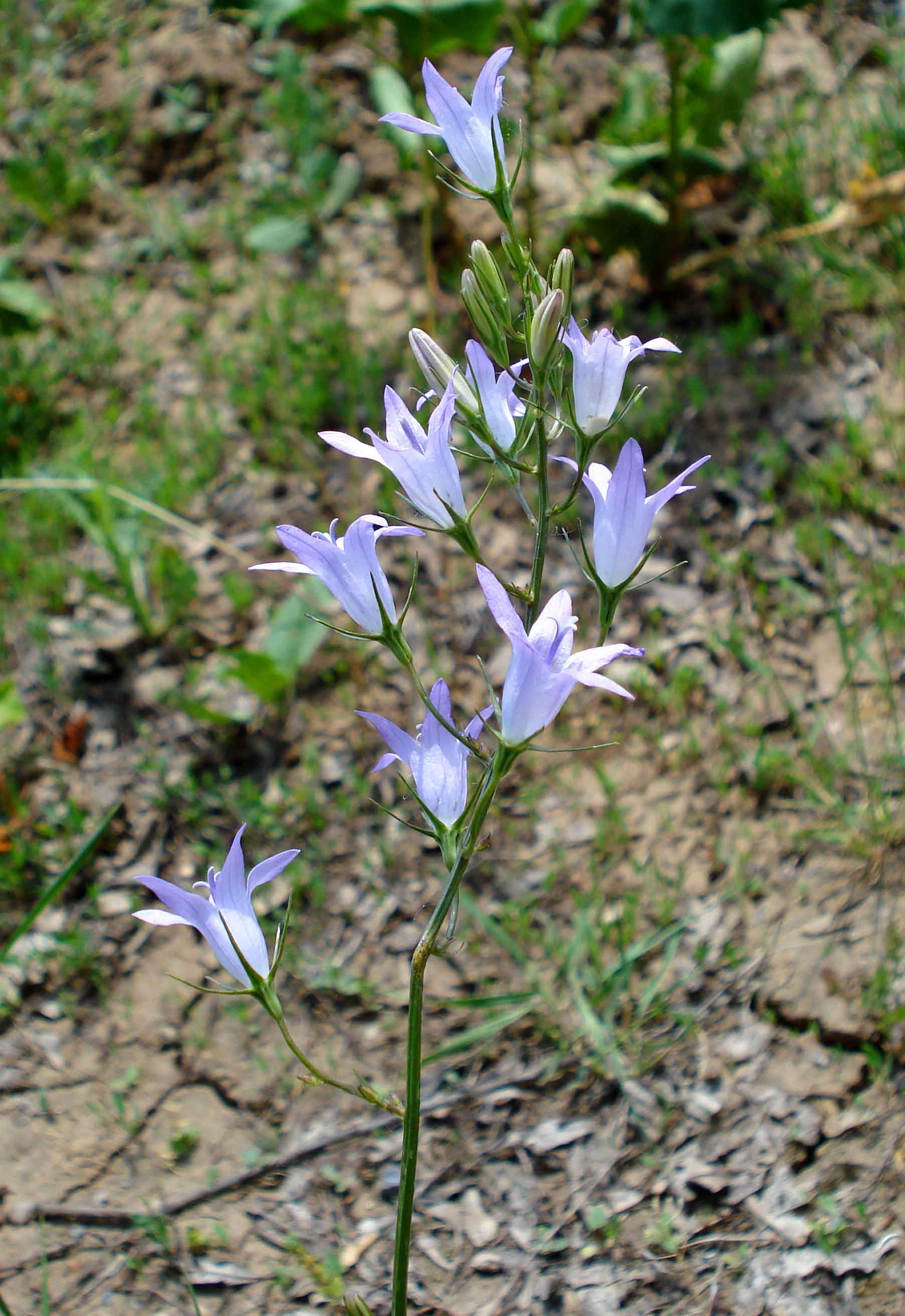 Campanula rapunculus (Unterfranken, Germany)